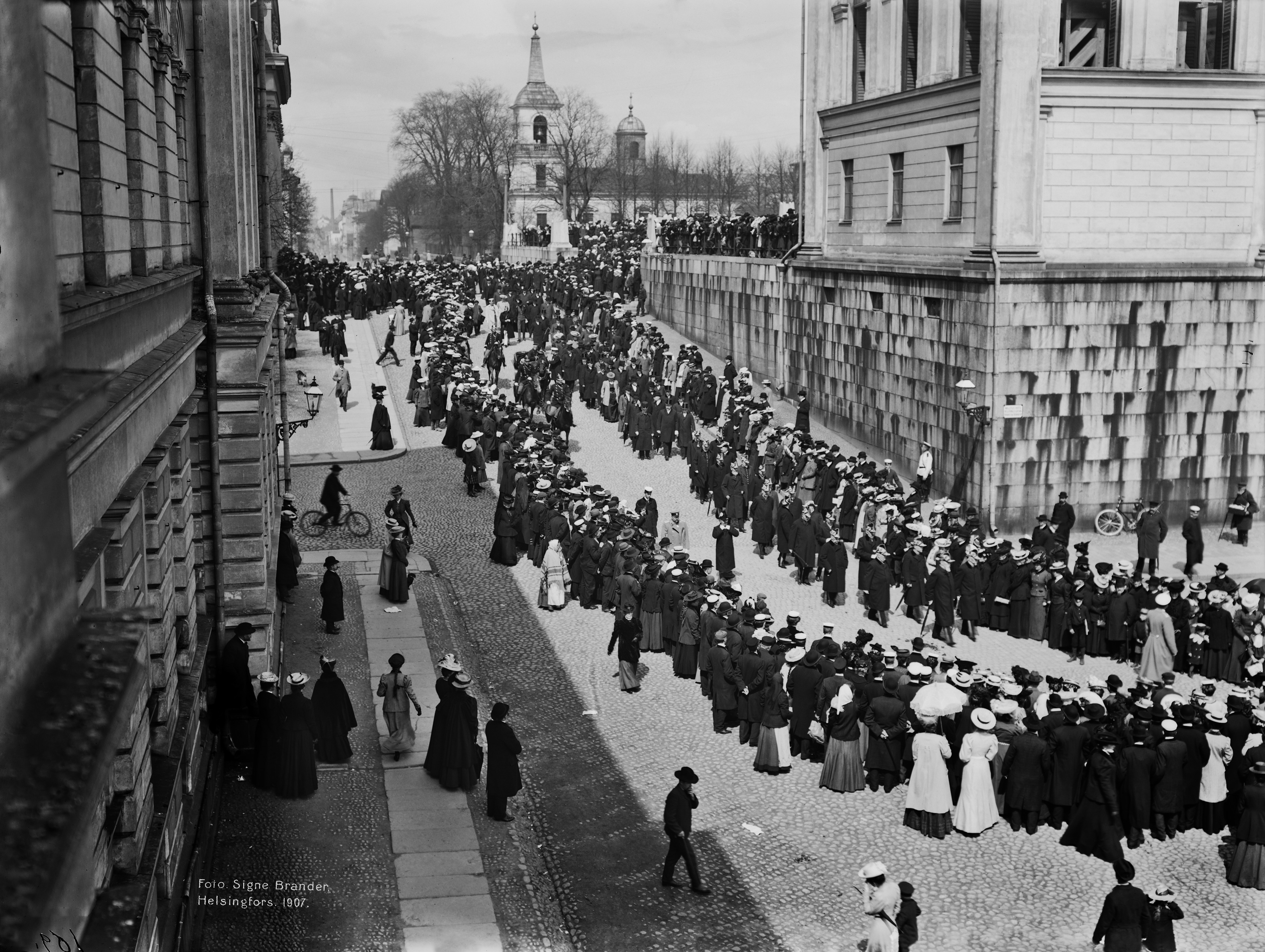 Ensimmäisten yksikamaristen valtiopäivien avajaiset. Juhlakulkue Unioninkadulla matkalla Nikolainkirkosta (Tuomiokirkosta) Keisarilliseen palatsiin. -- negatiivi ja vedos, lasi paperi, mv